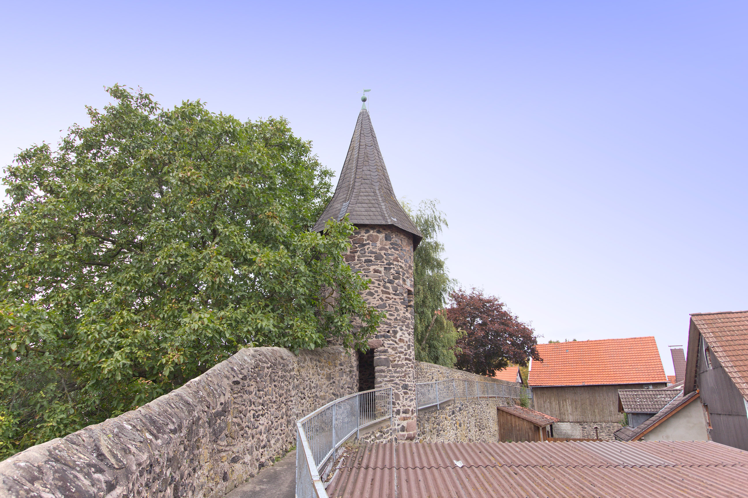 Wehrmauer (1258 - 1271) in Herbstein im Vogelsberg;rechts davon ein Nebengebäude von Am Schlag 1, rechts Haus Nr. 3.